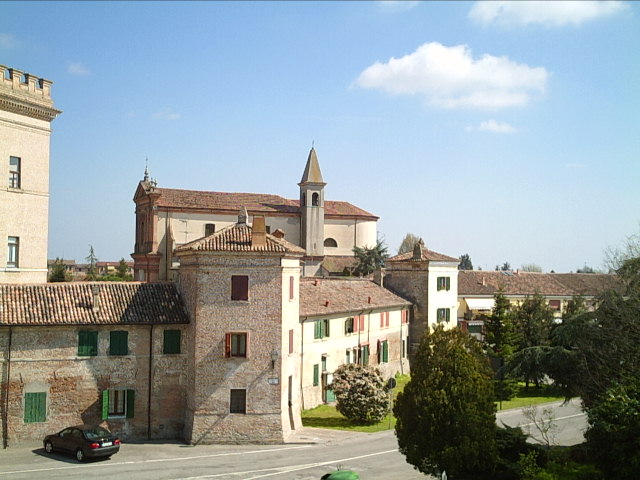 Castello Estense di Mesola - MIBAC This is a photo of a monument which is part of cultural heritage of Italy.